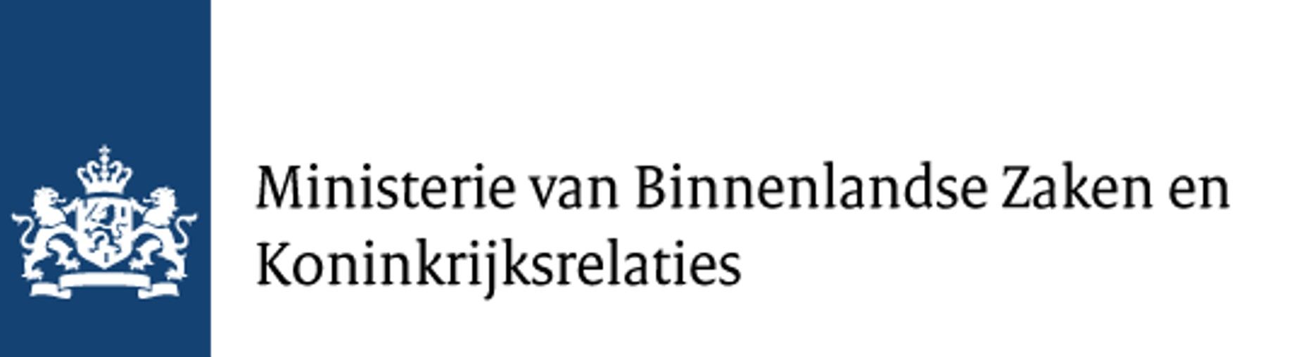 Het officiële logo van het Ministerie van Binnenlandse Zaken en Koninkrijksrelaties.